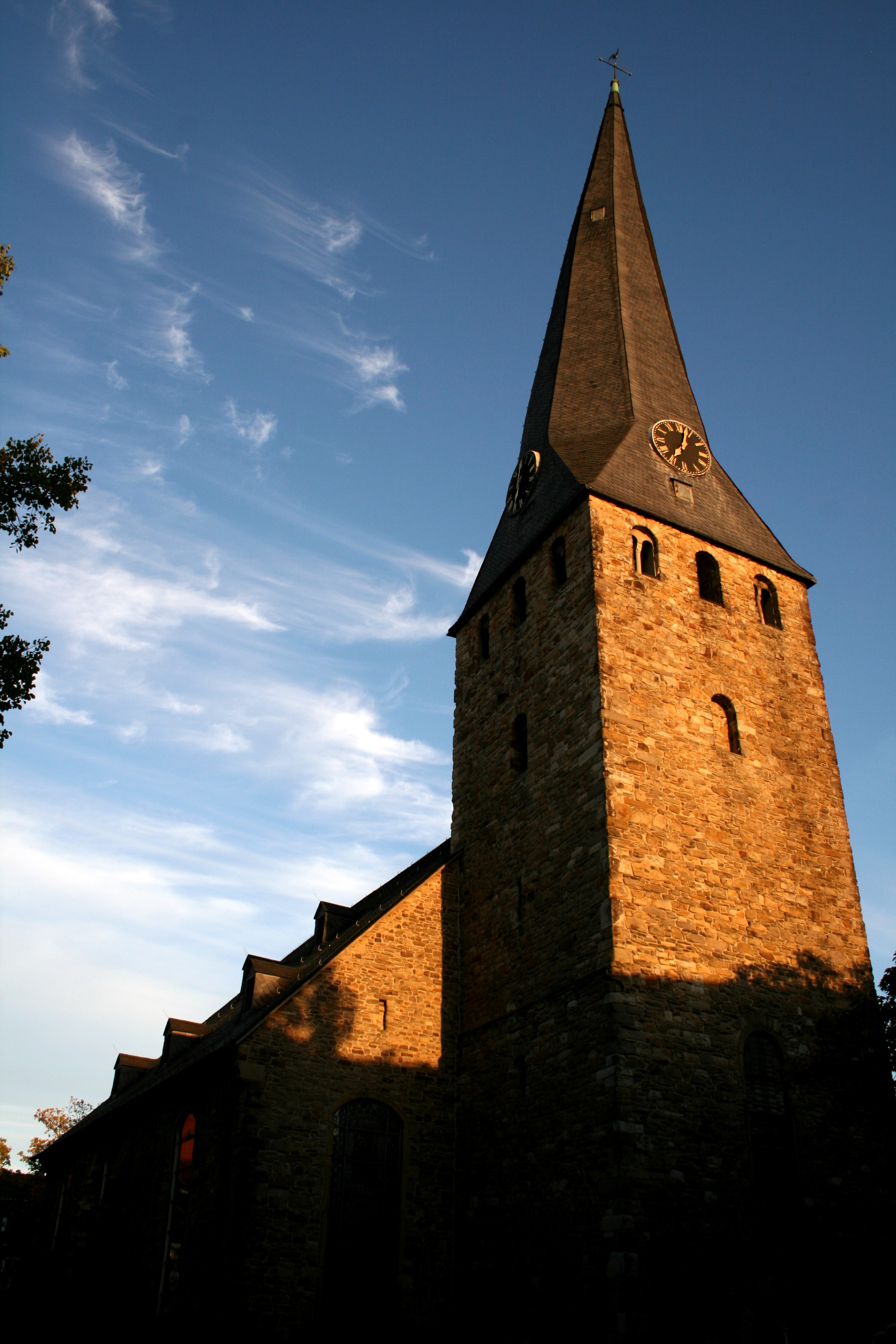 Hattingen (Ruhr): Kirche St. Georg mit schiefem Turm